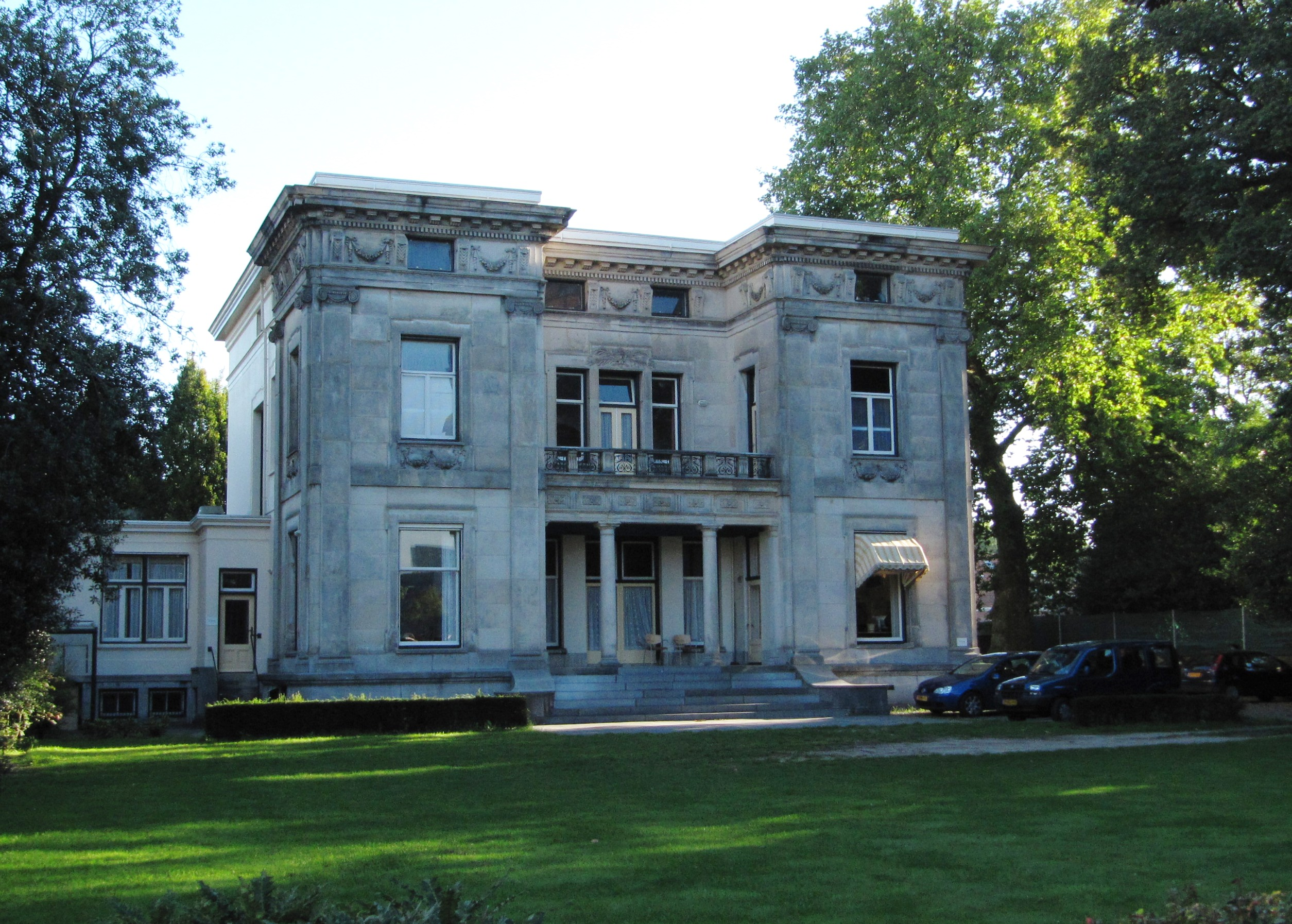 RM510633_-_Enschede_-_Hengelosestraat_40